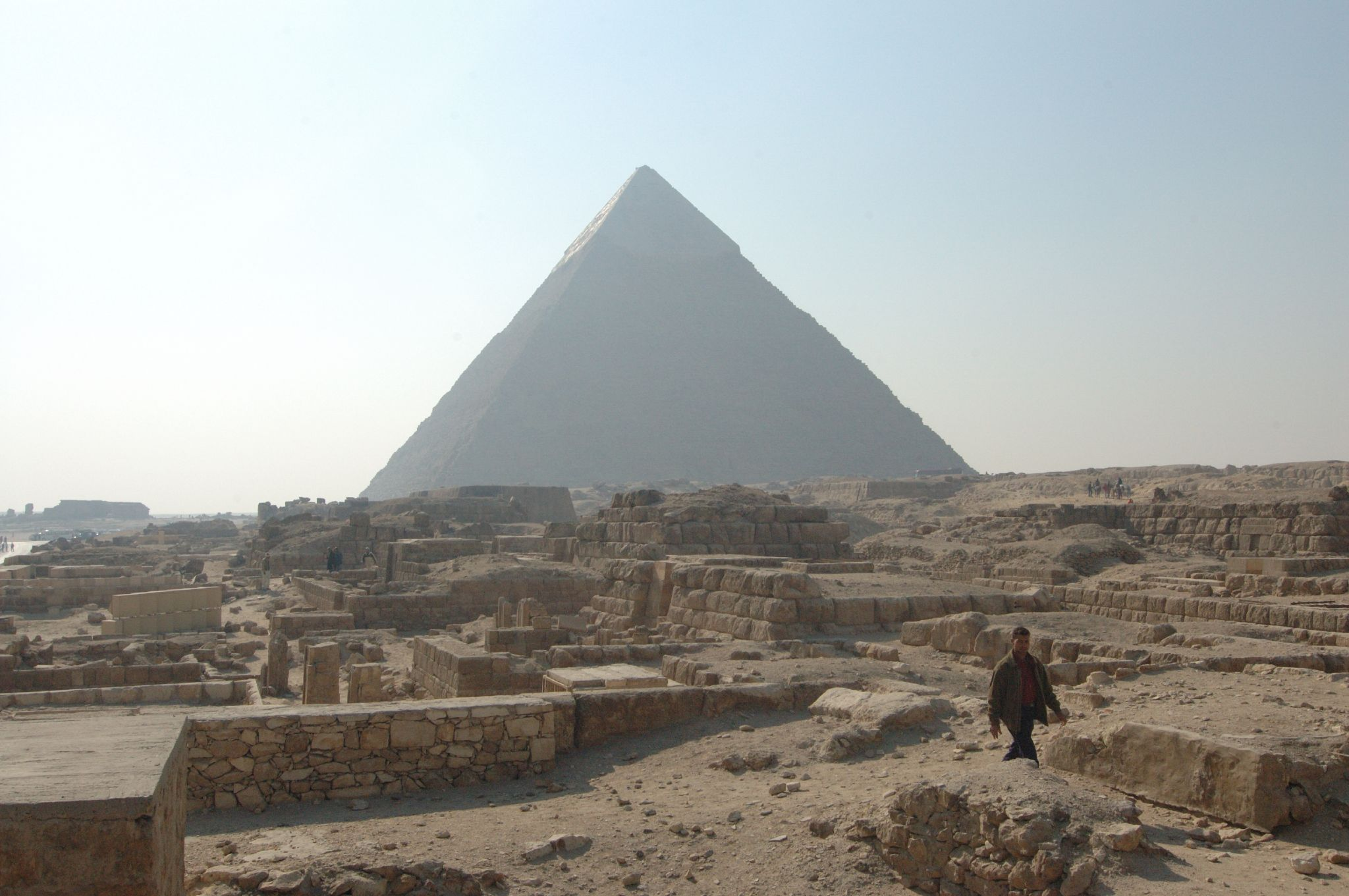 Giza: mastabe e piramide di Chefren